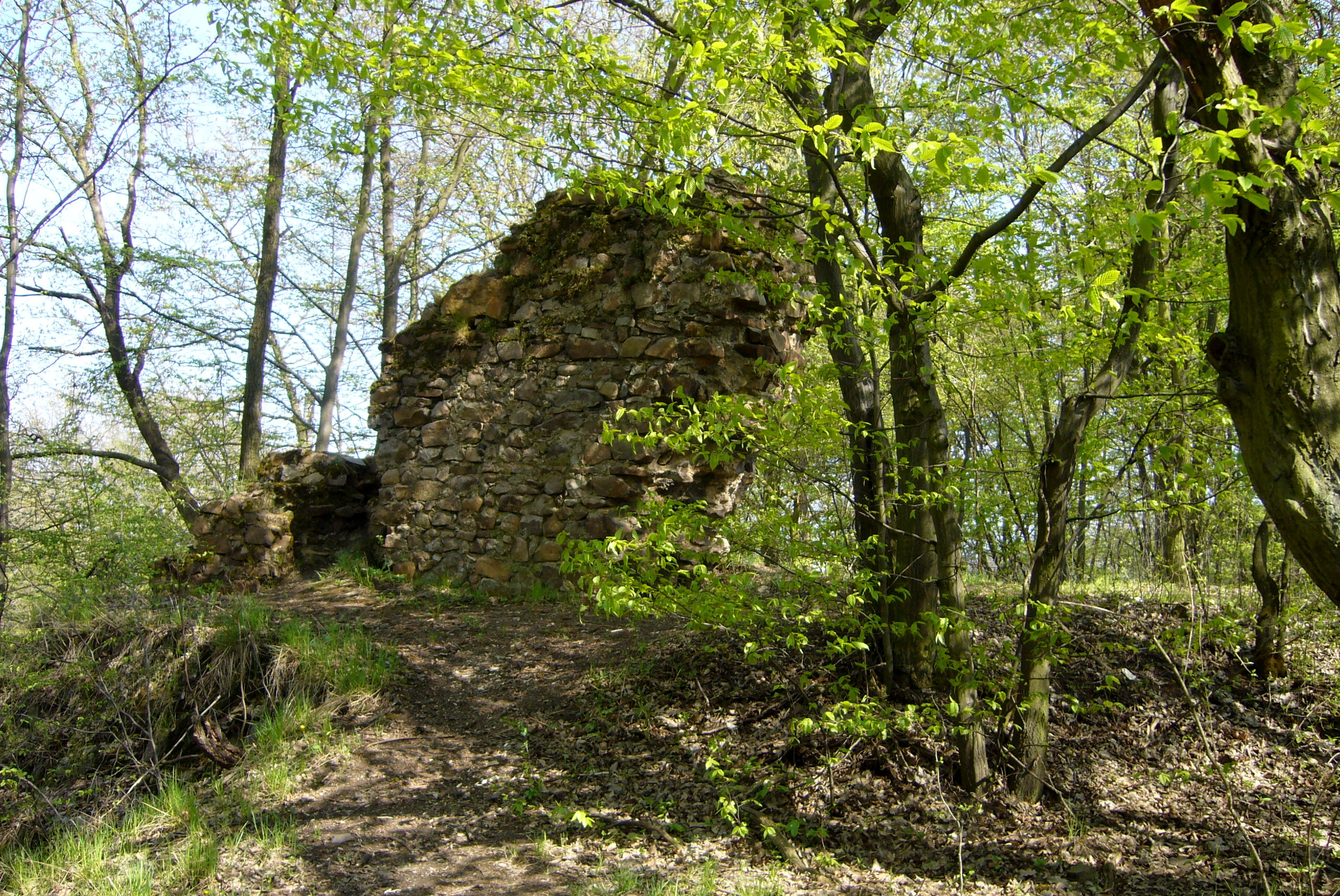 Hrádek nad Klabavou - fragment zdiva donjonu